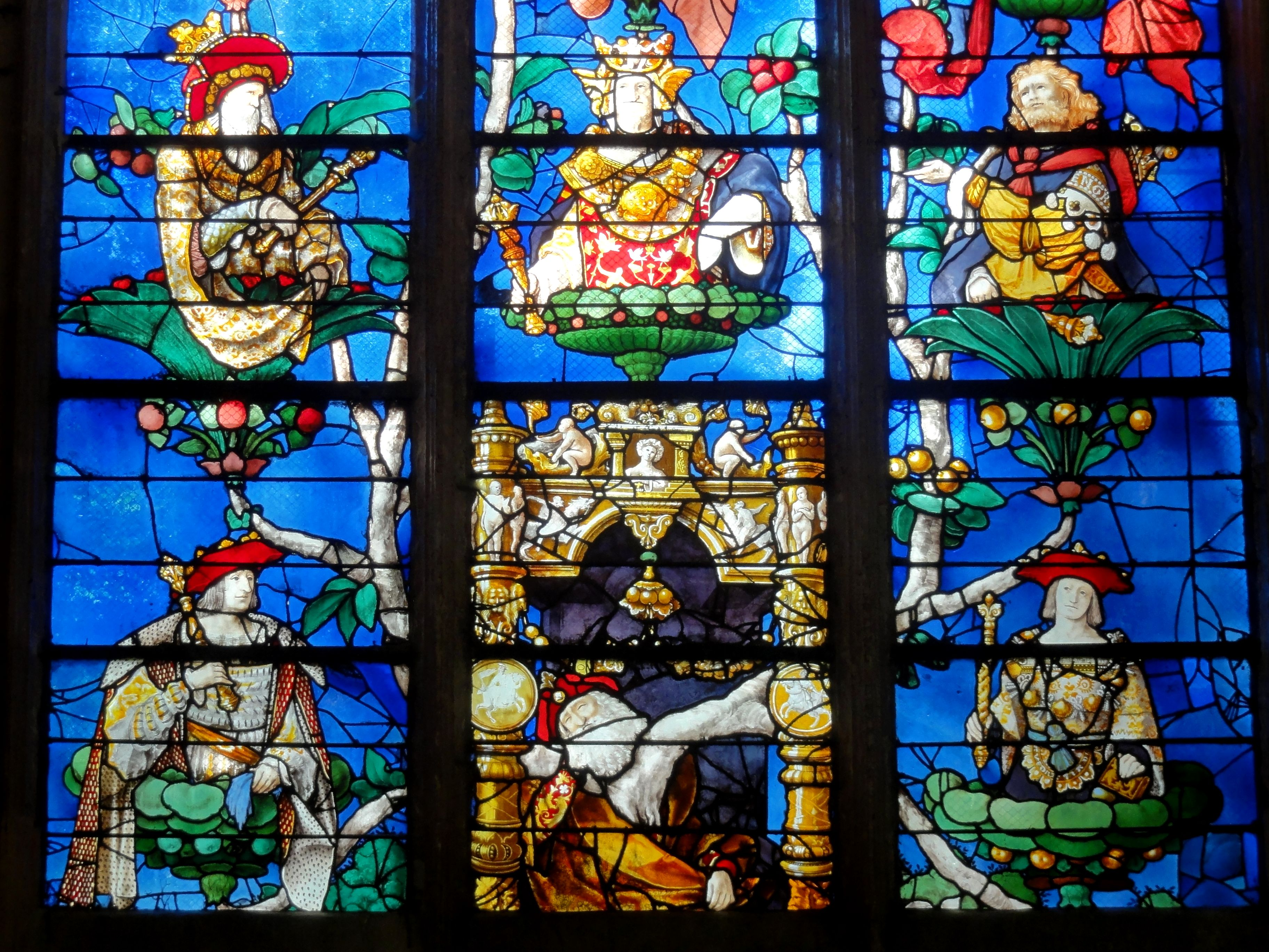 Vitrail de l'église Saint-Étienne de Beauvais, France, représentant l'arbre de Jessé.